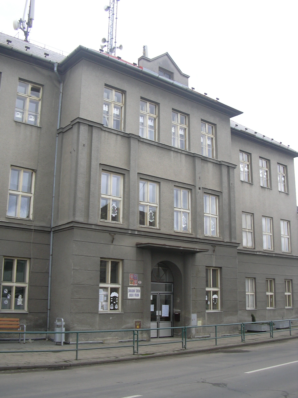 Základní škola v Brodku u Přerova